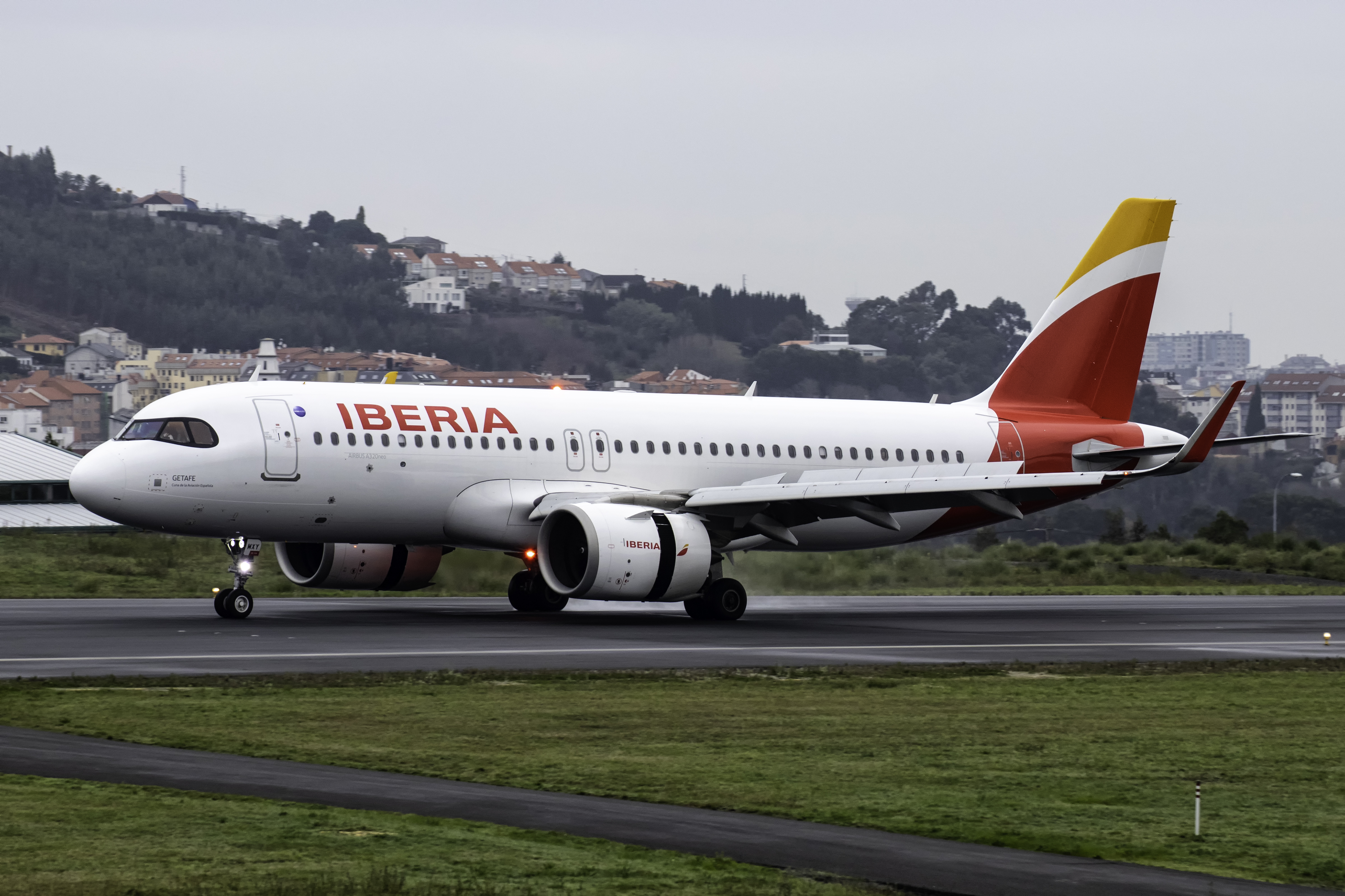 Airbus A320neo de Iberia aterrando no aeroporto da Coruña.